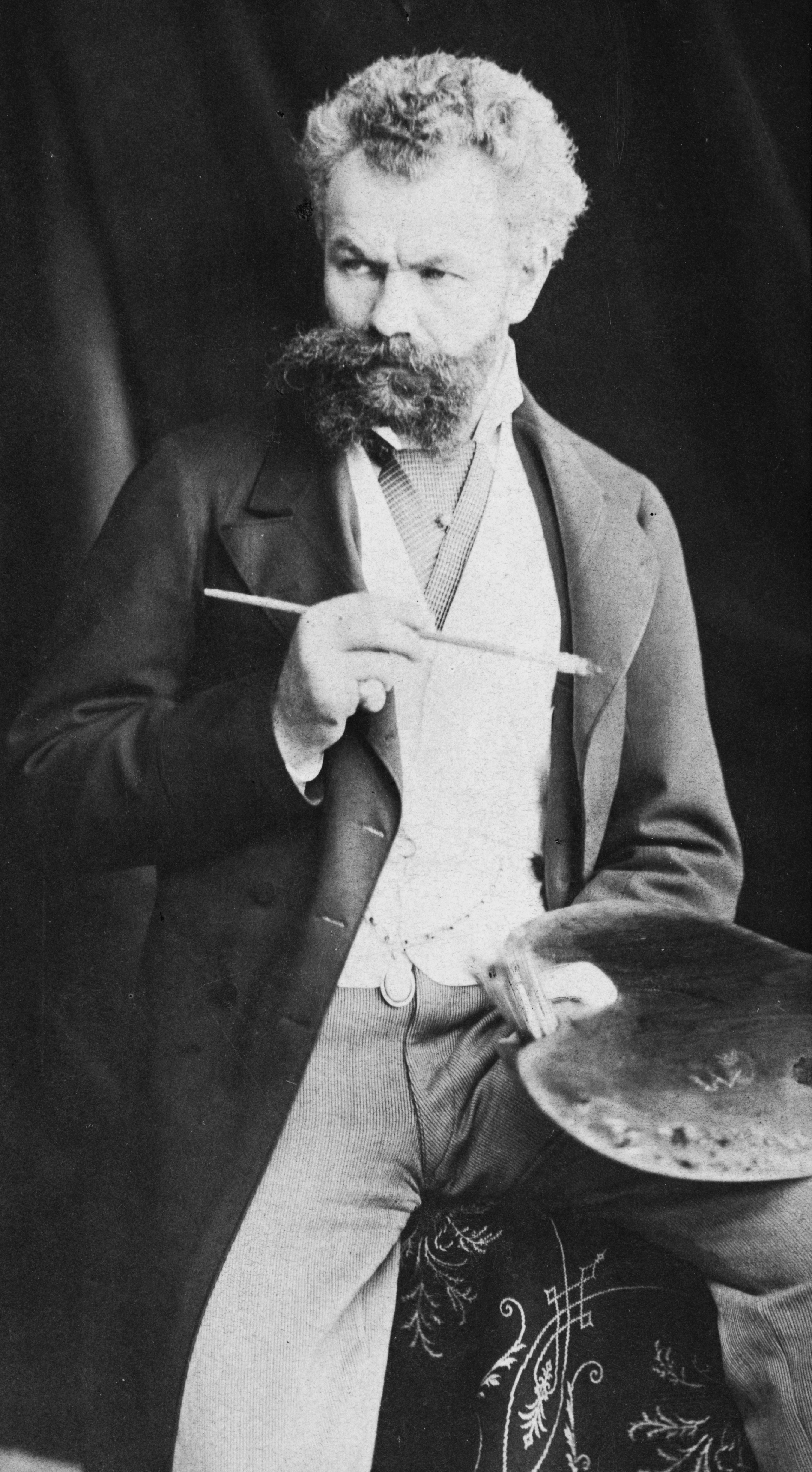 Munkácsy Mihály festőművész 1880 körül